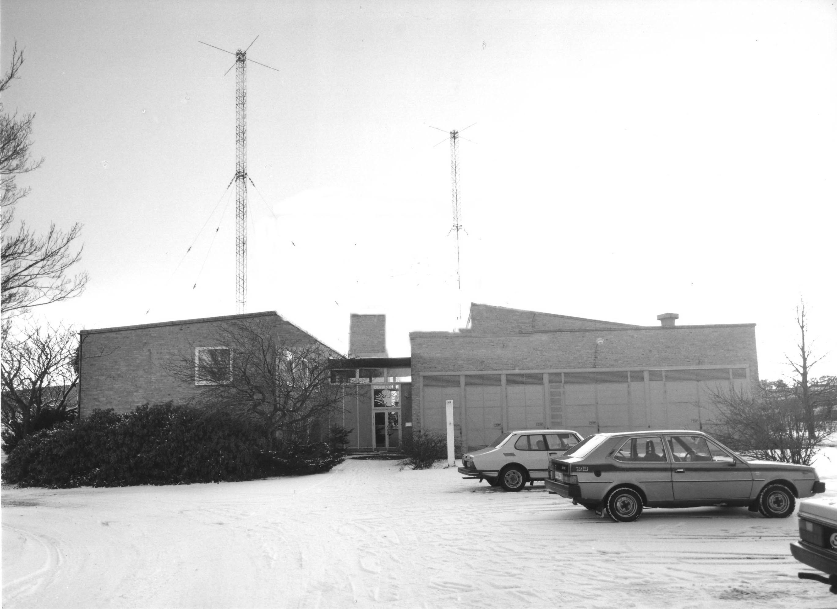 Ingången till Göteborg Rundradiostation. Sändarhallen är till höger